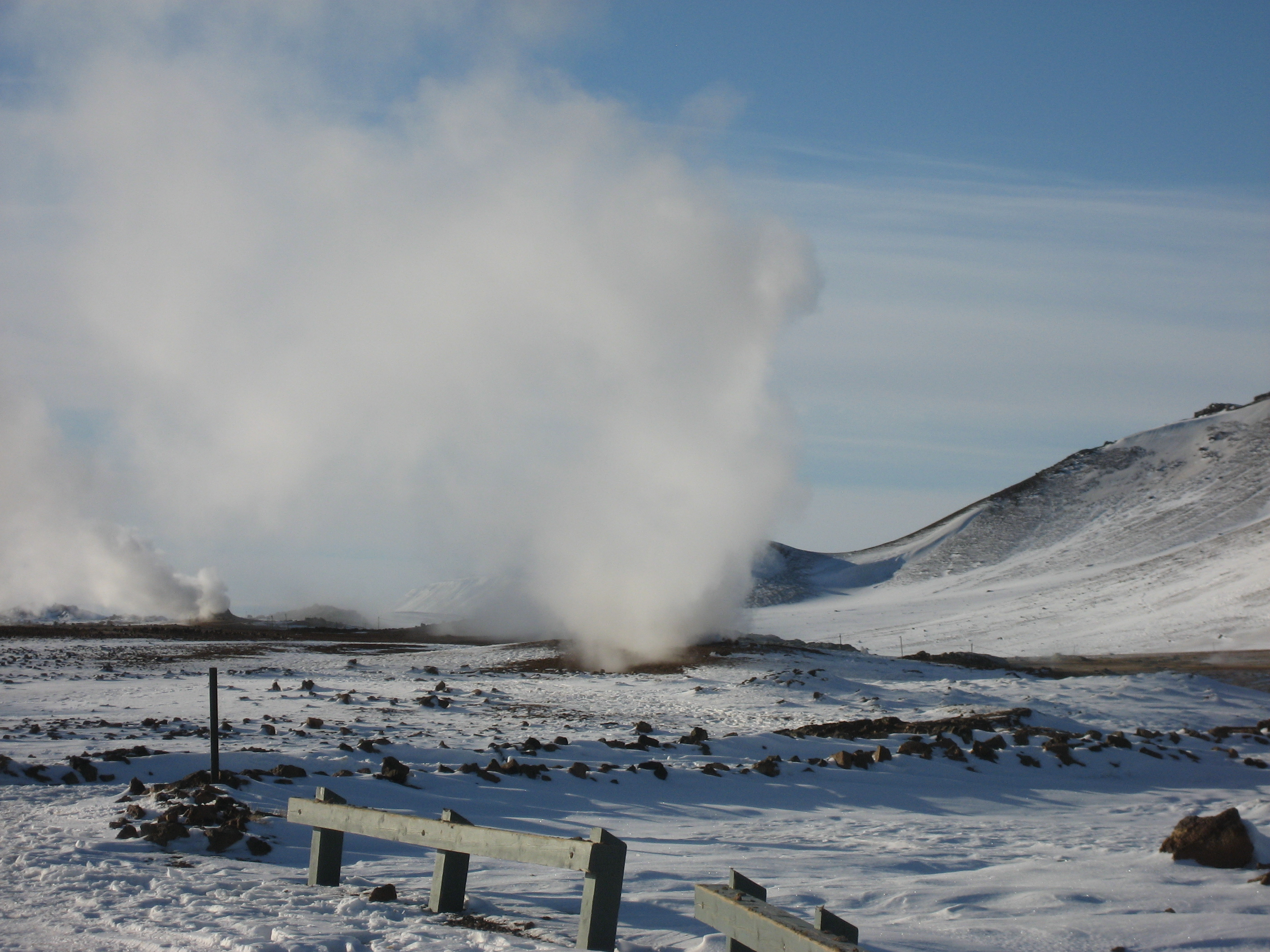 Mývatn, Islandia 2007